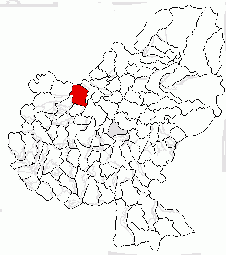 Categorie:Hărţi ale judeţului Mureş